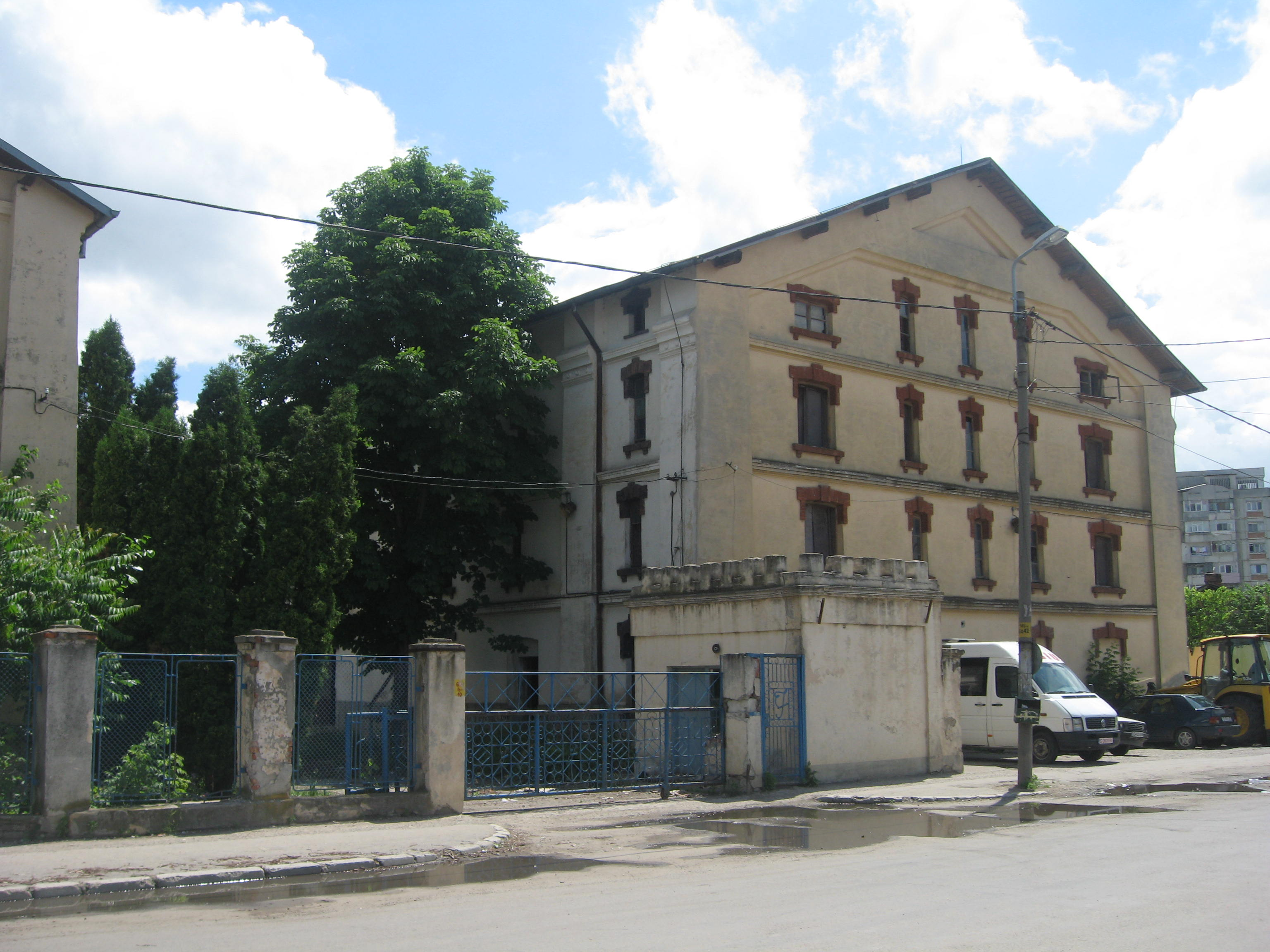 Fabrica de Ţigarete din iaşi